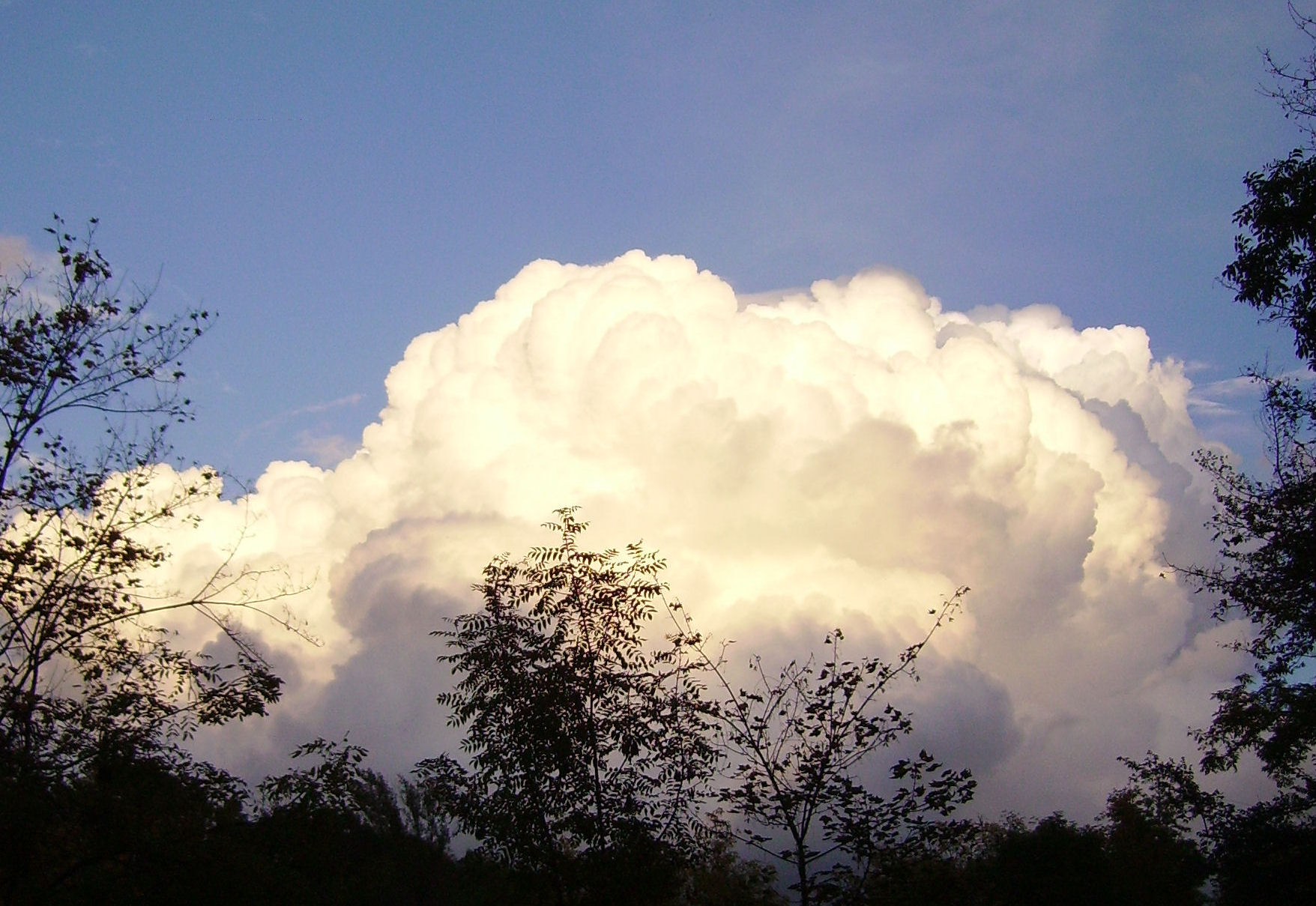 Cumulus clouds